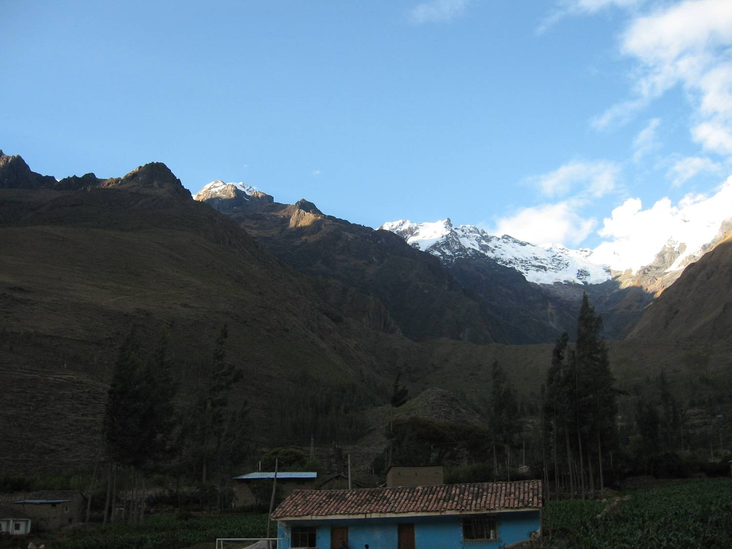 Vista nevado, camino a Machu Picchu